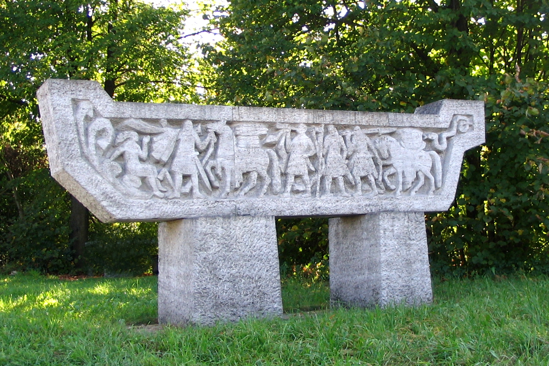 Großmehring, Landkreis Eichstätt, Oberbayern: Hagen überquert mit den Nibelungen die Donau